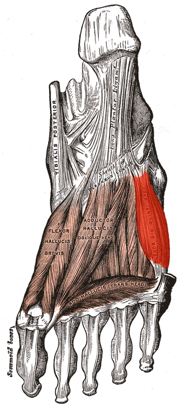 Musculus flexor digiti minimi brevis (foot)